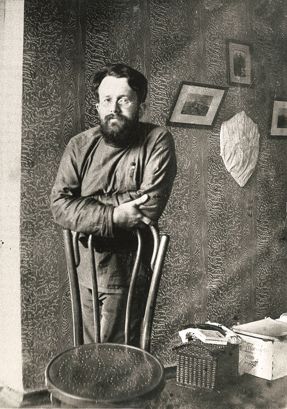 Олександр Грушевський— історик. Паньківська, 9. Початок 1910-х рр.